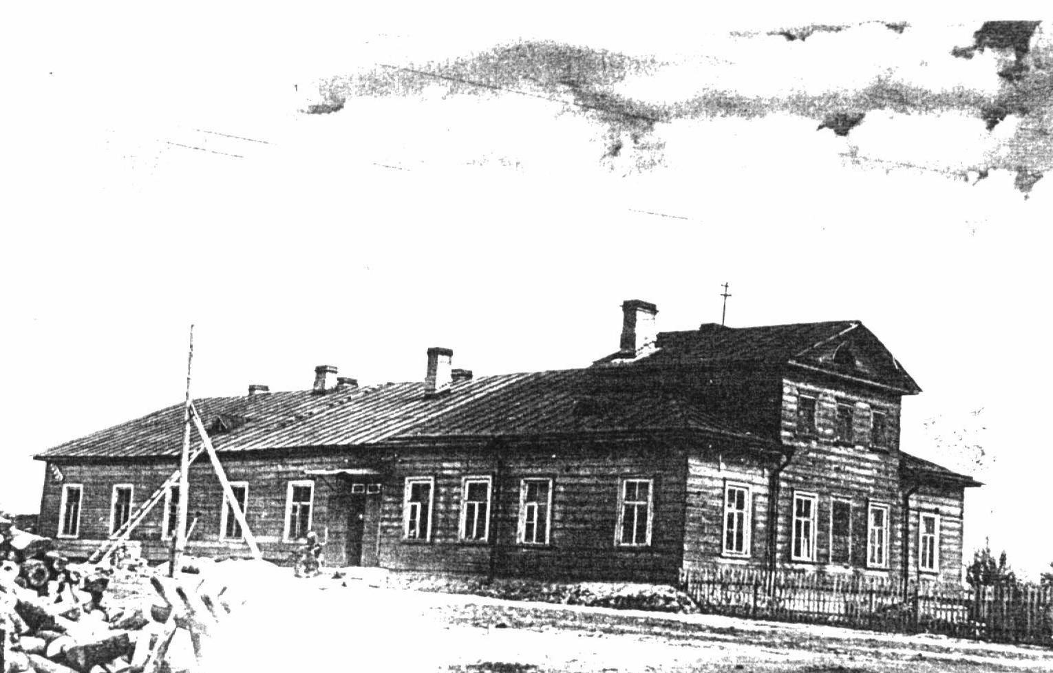 Беларуская (тарашкевіца): Нямецкая каляніская школа ў Новасаратаўке